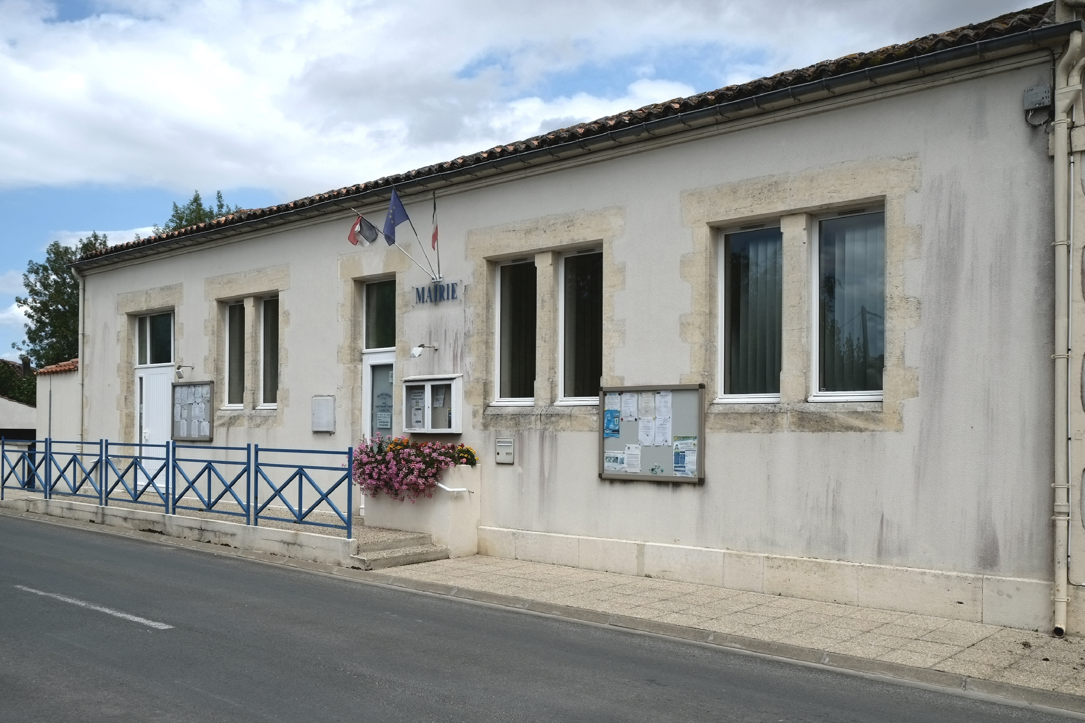 Mairie Les Touches-de-Périgny Charente-Maritime France